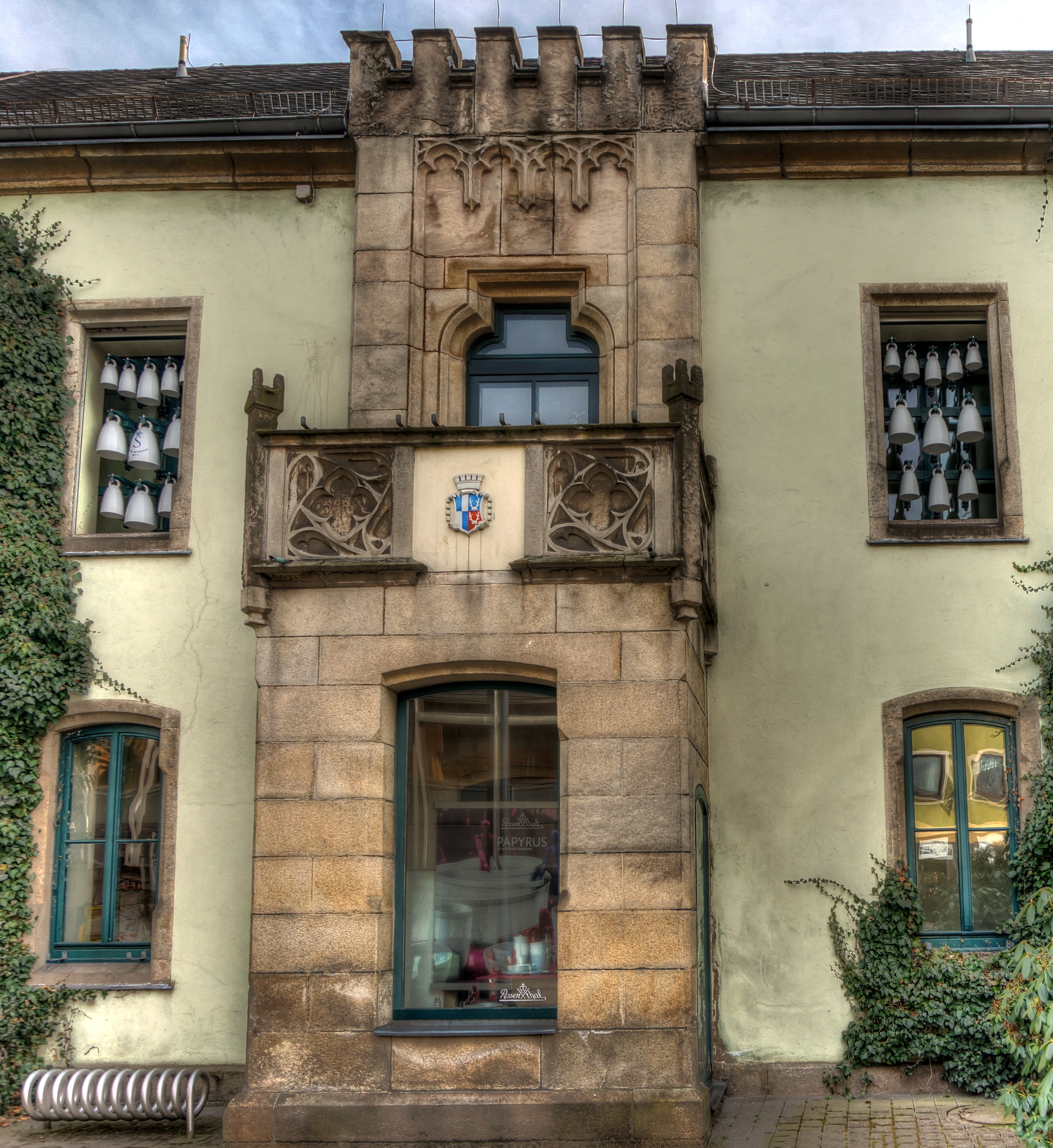 Deutschland, Bayern, Landkreis Wunsiedl, Selb, Rathaus, Porzellanglocken